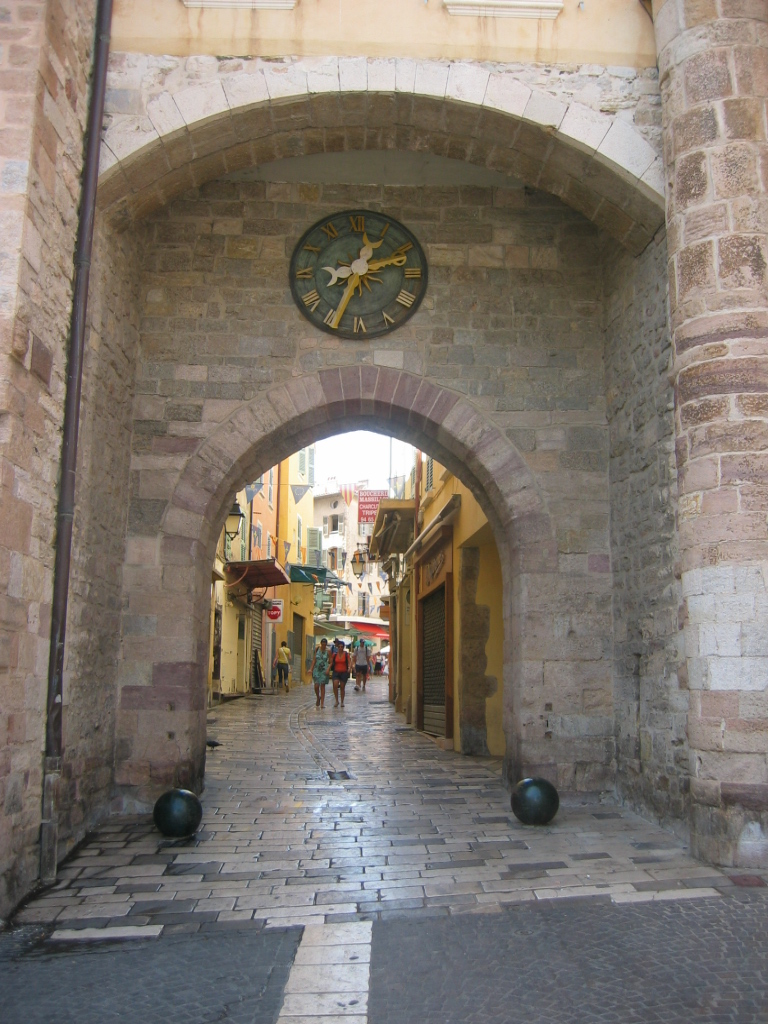 Porte de la Rade, Hyère .